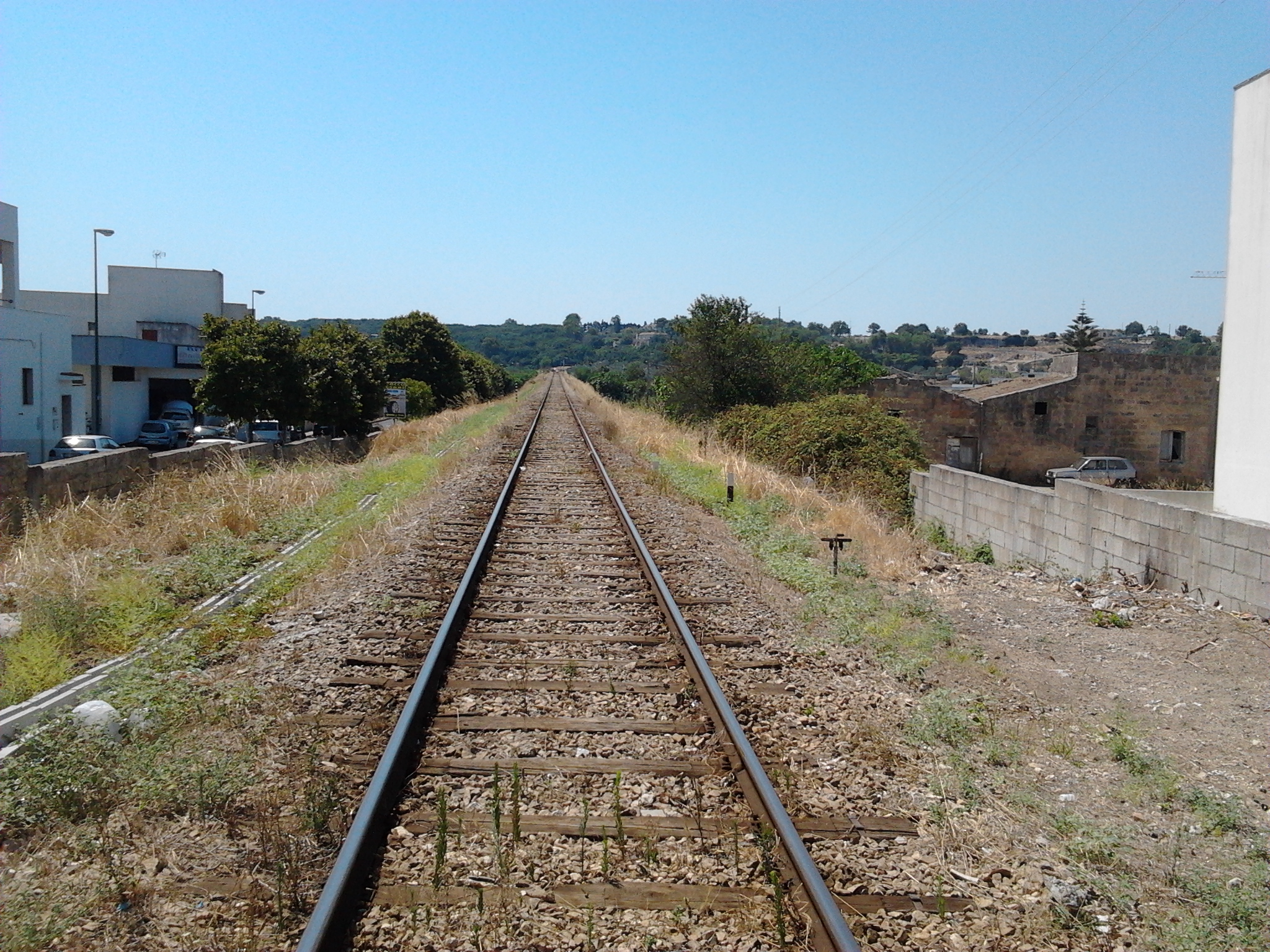 Binari in uscita stazione di Tricase (LE)